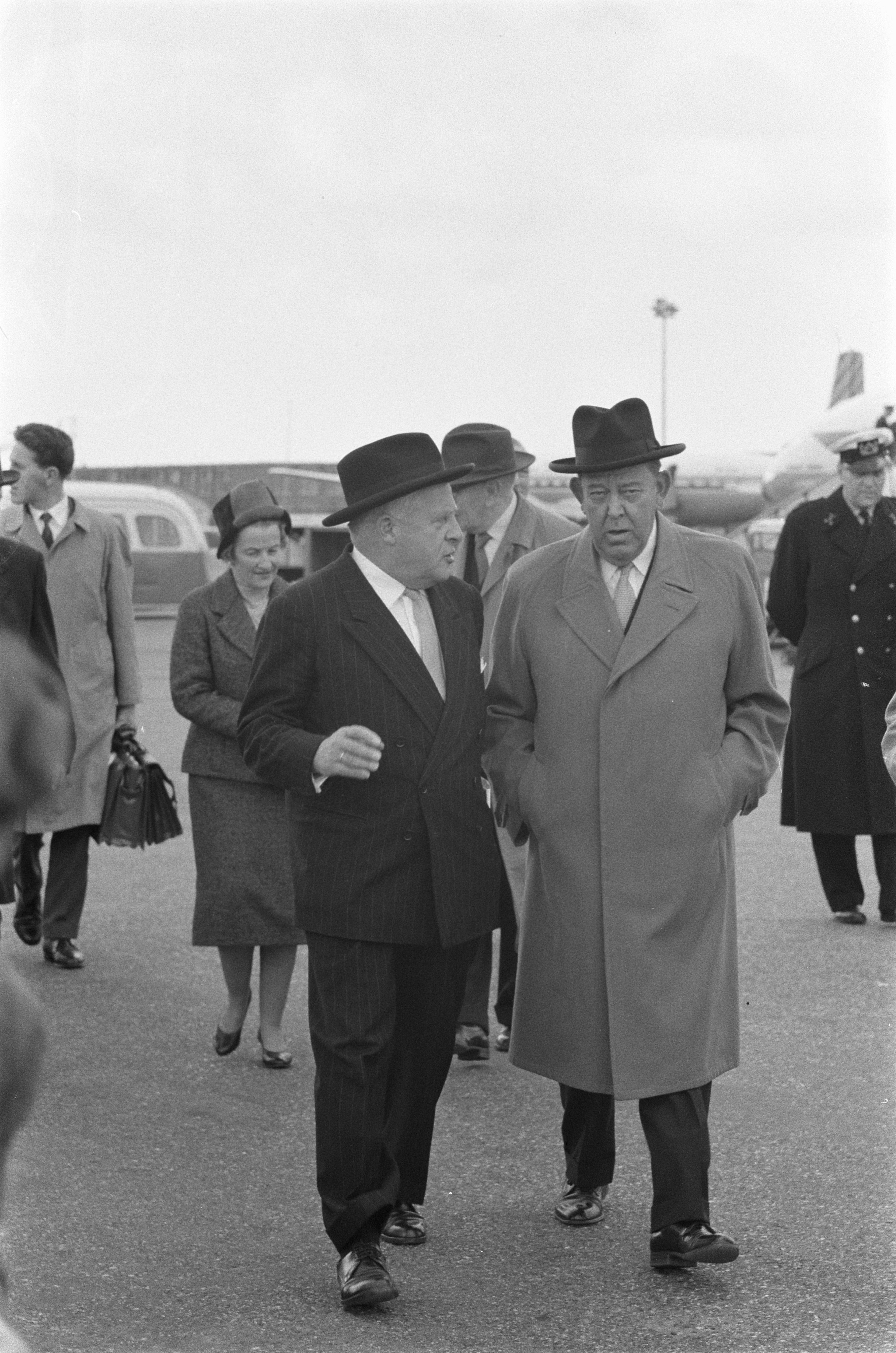 Collectie / Archief : Fotocollectie Anefo Reportage / Serie : [ onbekend ] Beschrijving : Aankomst van Trygve Lie op Schiphol voor 5-daagse bespreking Datum : 17 oktober 1960 Locatie : Noord-Holland, Schiphol Trefwoorden : aankomsten, besprekingen Persoonsnaam : Trygve Lie Fotograaf : Pot, Harry / Anefo Auteursrechthebbende : Nationaal Archief Materiaalsoort : Negatief (zwart/wit) Nummer archiefinventaris : bekijk toegang 2.24.01.05 Bestanddeelnummer : 911-6762